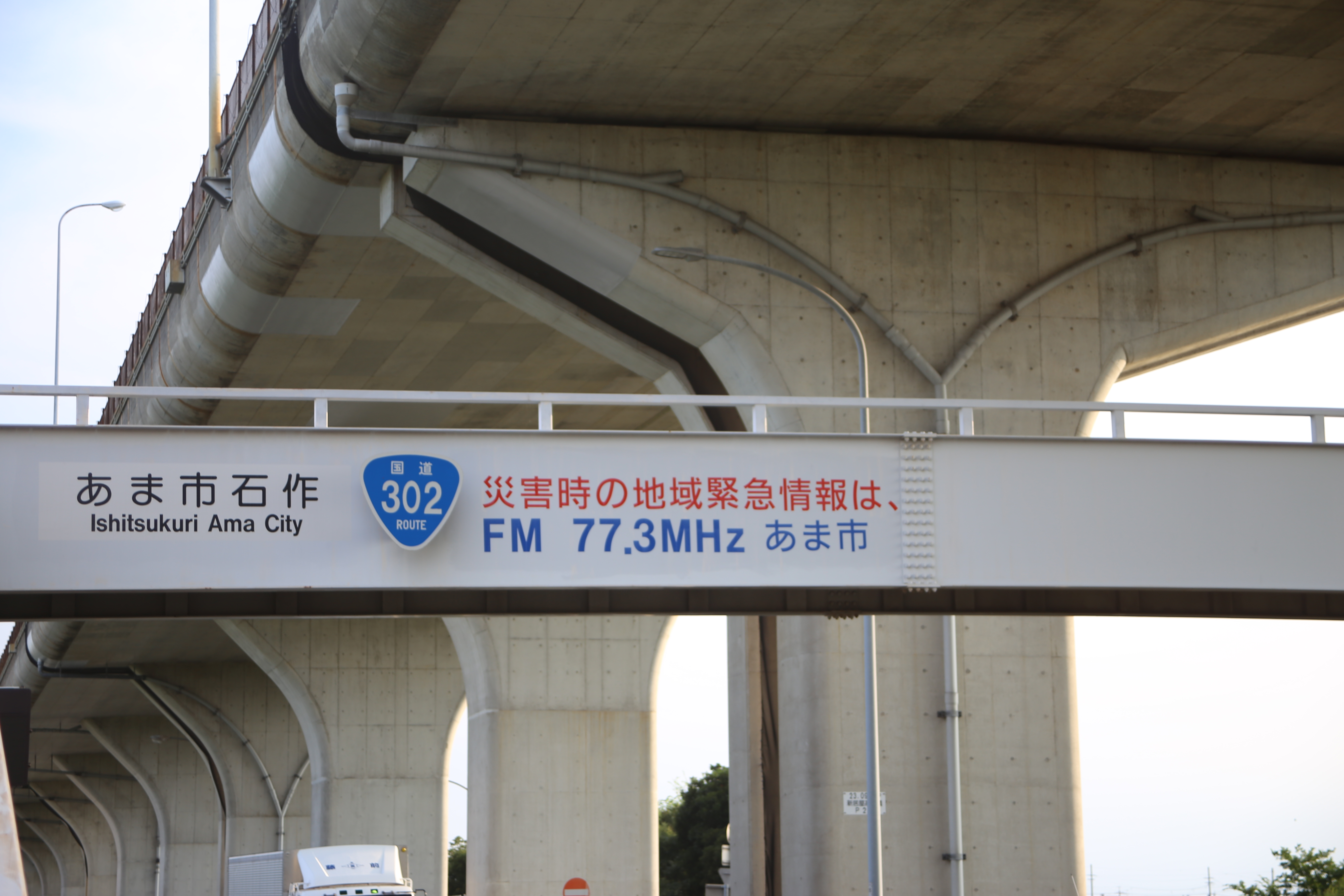 愛知県あま市石作の国道302号に設置されている歩道橋上のFMななみ（にしおわりエフエム）の案内表示